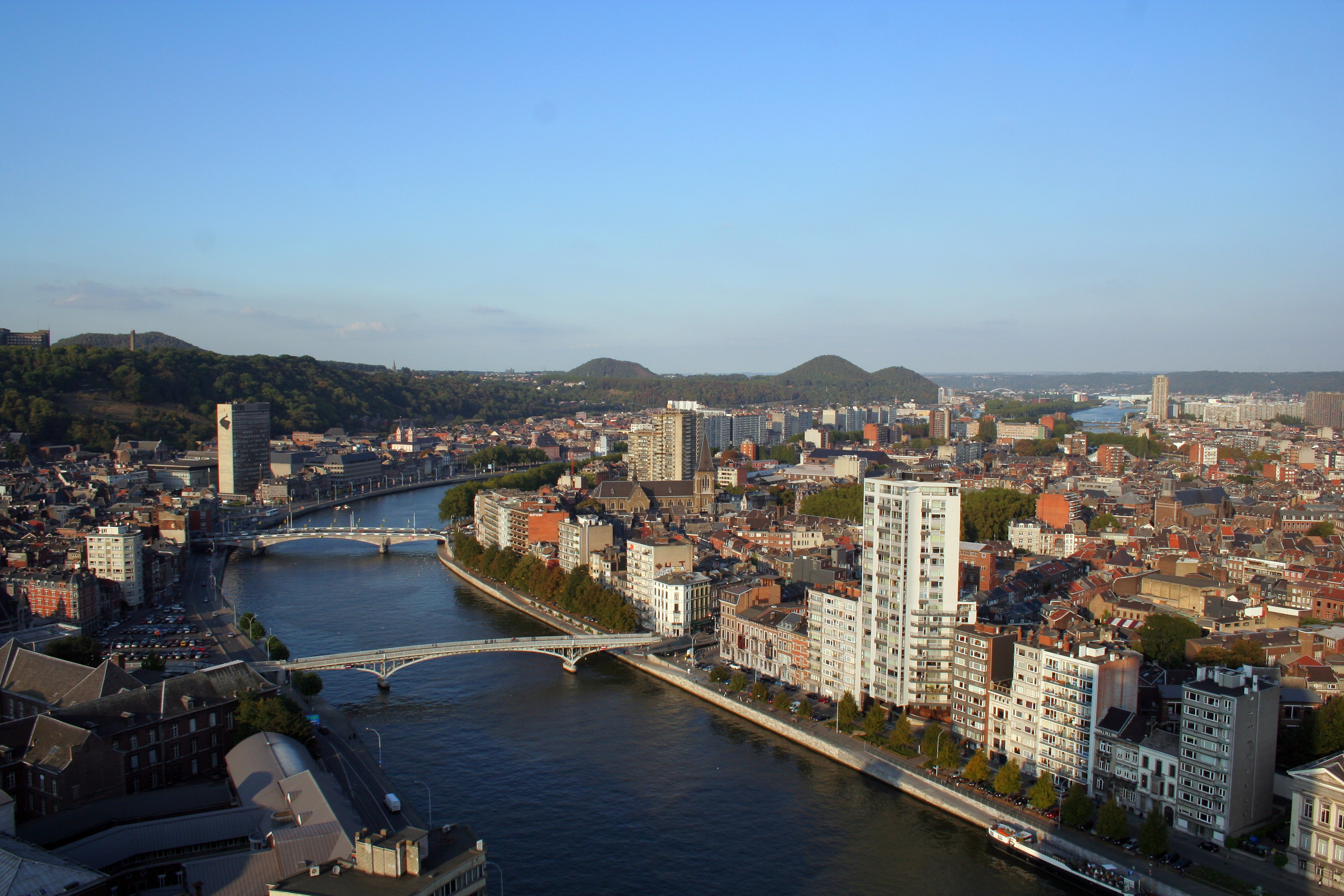 View of Liège, Belgium